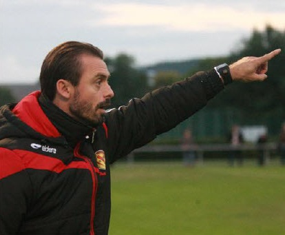 Photo de Jonathan Jäger